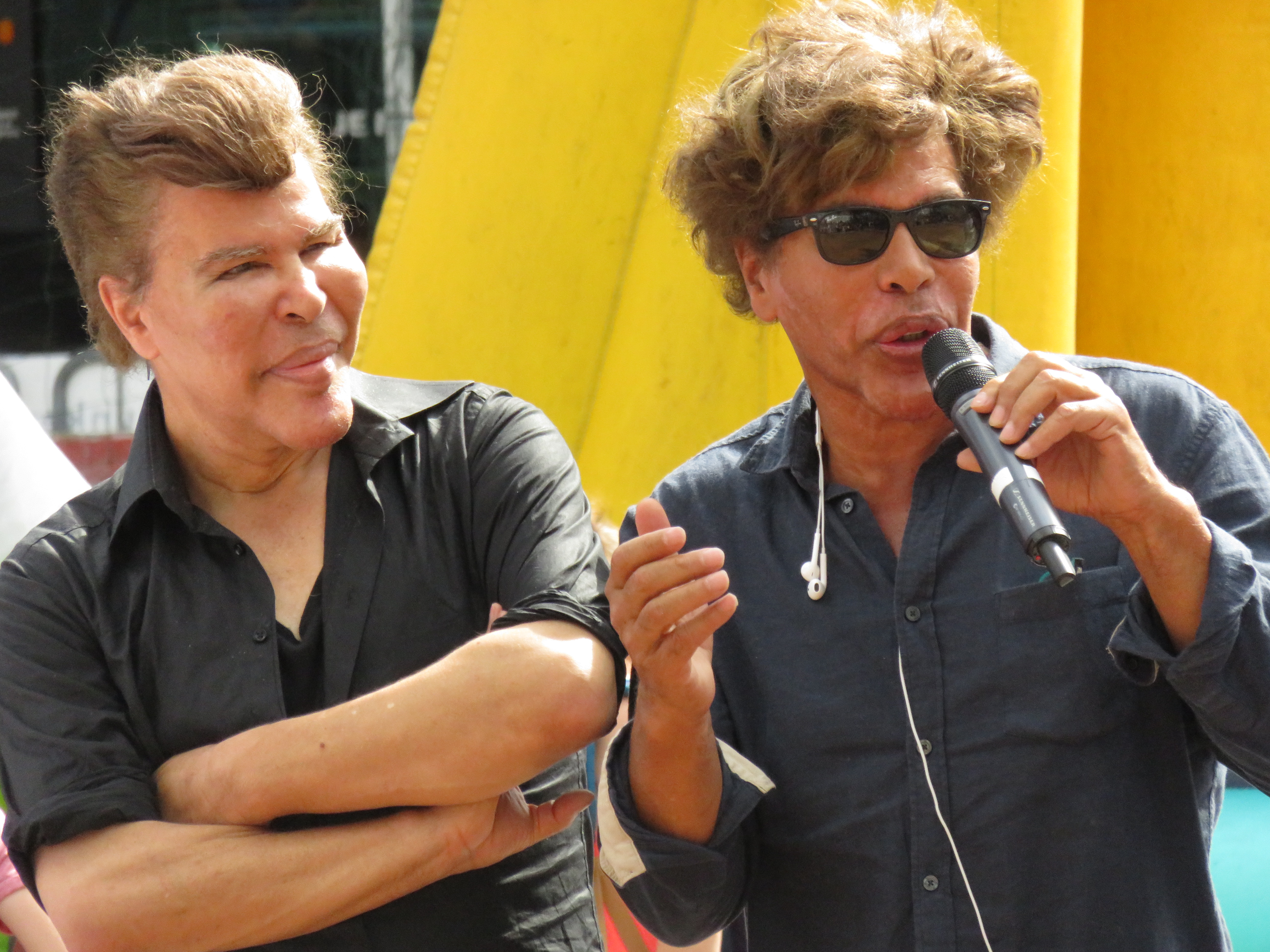 Igor et Grichka Bogdanoff lors de la présentation de l'équipe du DMBC dans le cadre de l'inauguration de la boutique "Passion Sport" à Dunkerque.